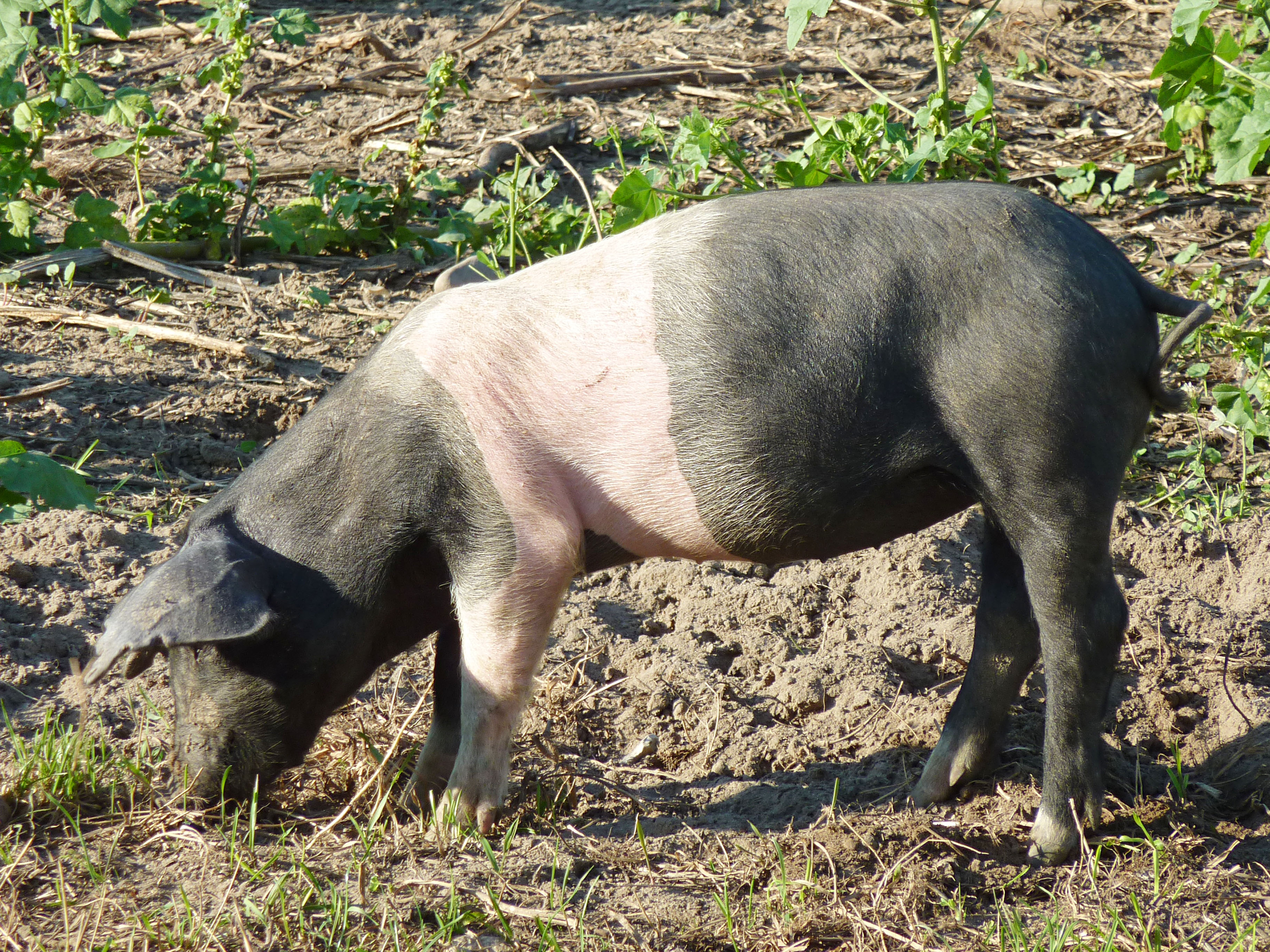 Junges Deutsches Sattelschwein im Freilandmuseum Domäne Dahlem, Berlin, Deutschland.